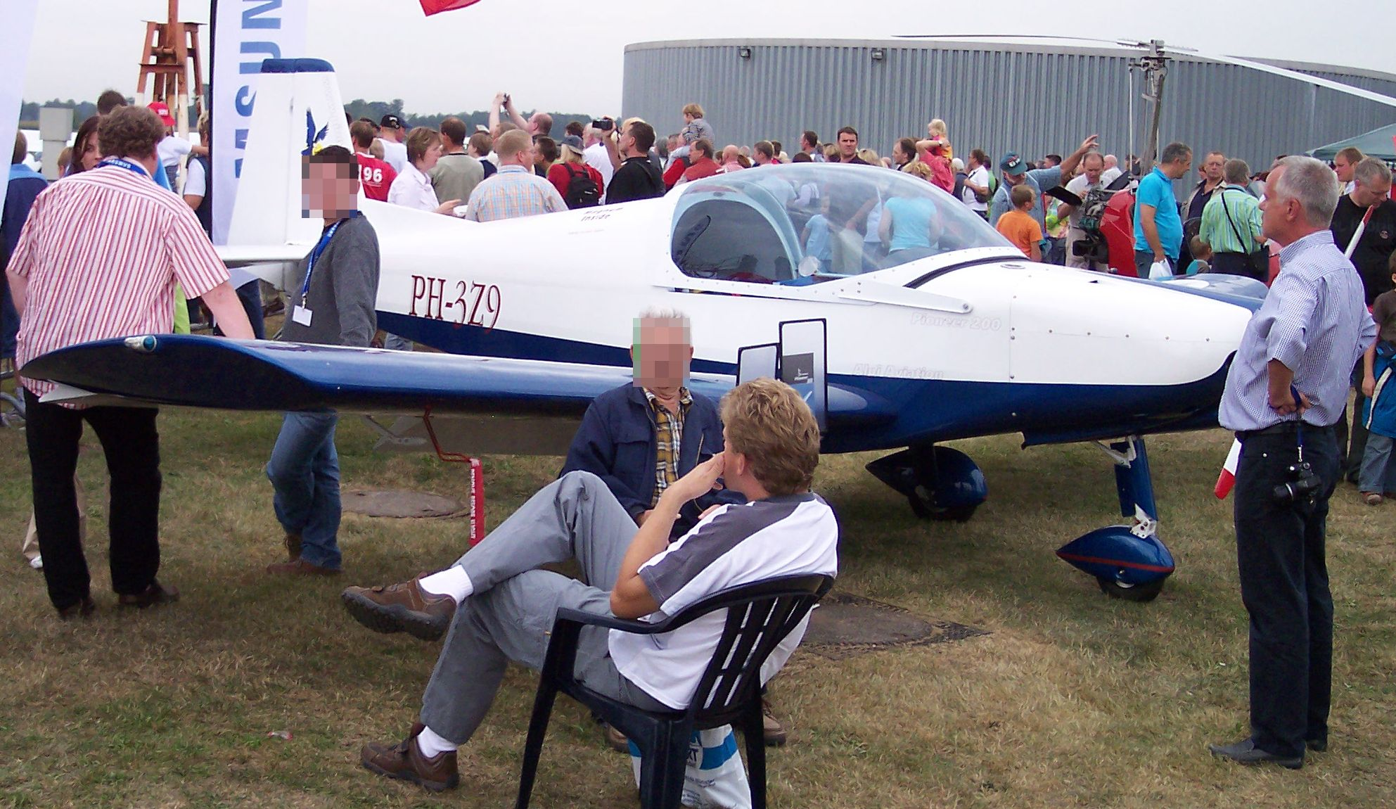 Alpi Pioneer 200 (PH-3Z9)